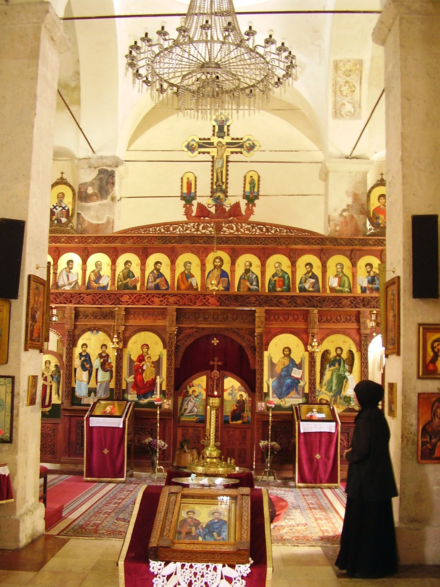 Rakovac monastery iconostasis, Fruška Gora, Serbia.